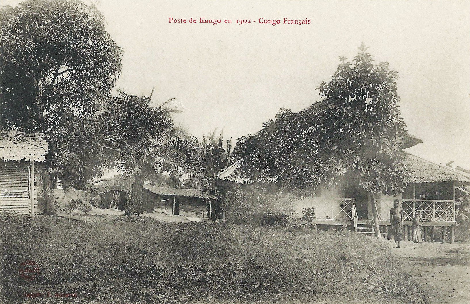 Poste de Kango en 1902. Collection J. Audema. Phot. A.B. & Cie, Nancy [Albert Bergeret] Congo Français